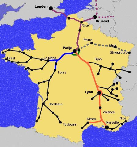 Карта пруга великих брзина у Француској.